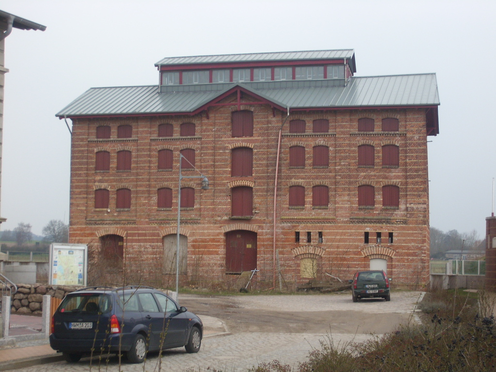 Hafenspeicher an der Stepenitz in Dassow in Mecklenburg.